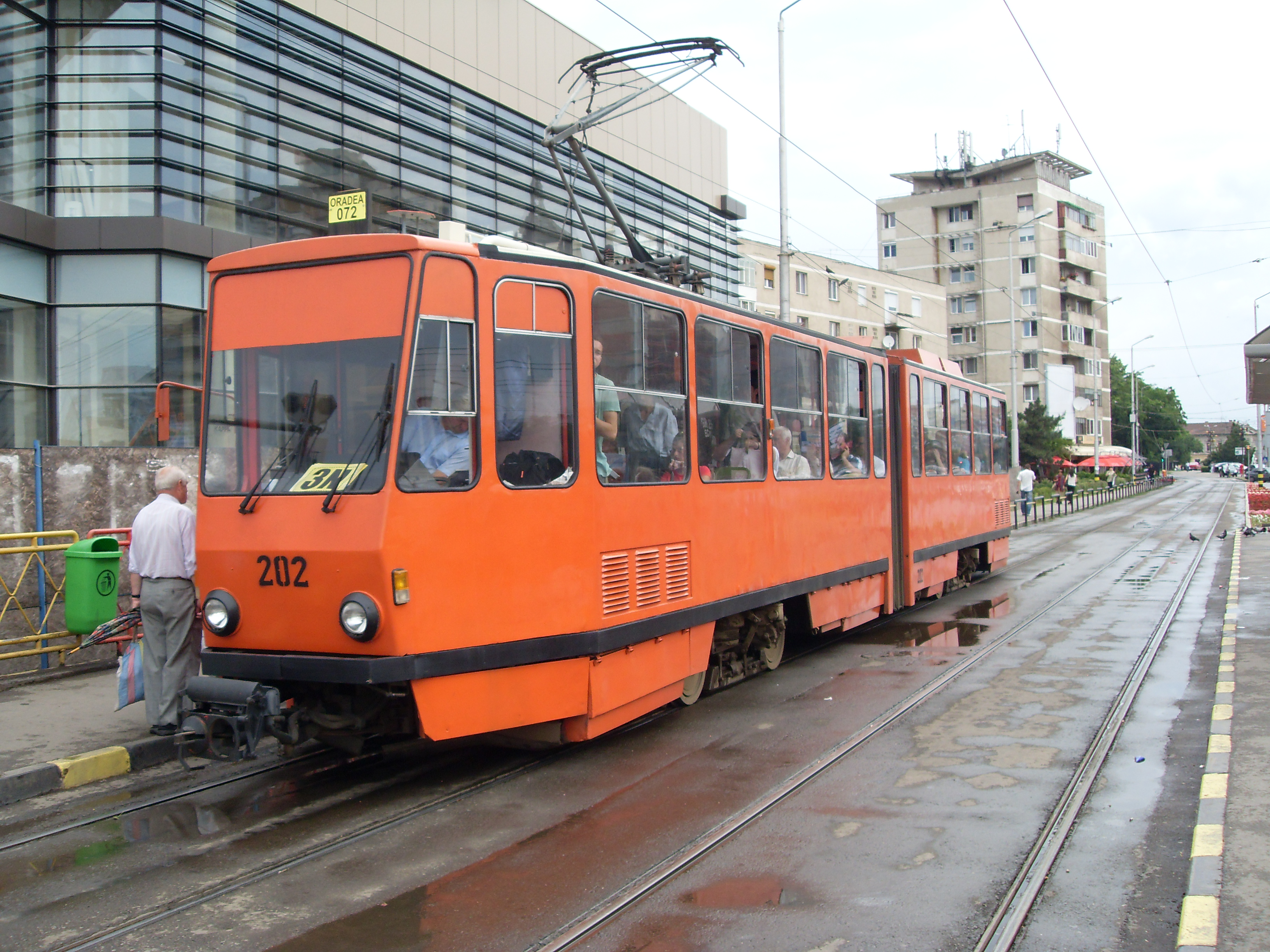 Tramwaj w Oradei